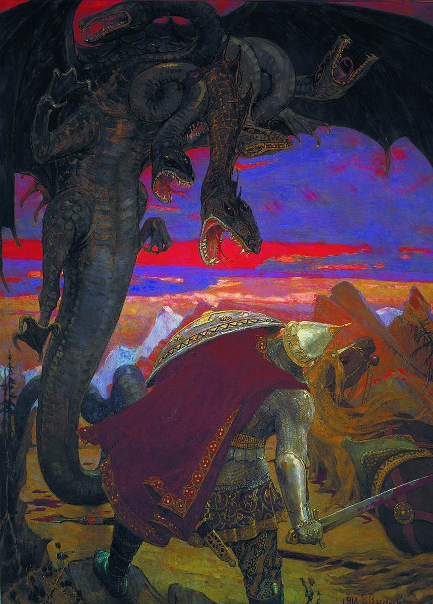 Виктор Васнецов. Бой Добрыни Никитича с семиглавым Змеем Горынычем. 1918. 267 x 196 см. Дом-музей В.М. Васнецова, Москва